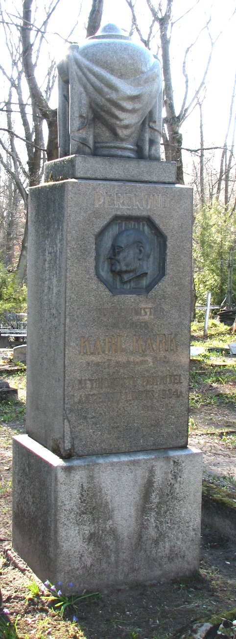 Karl Karki haud Tallinna Siselinna kalmistul